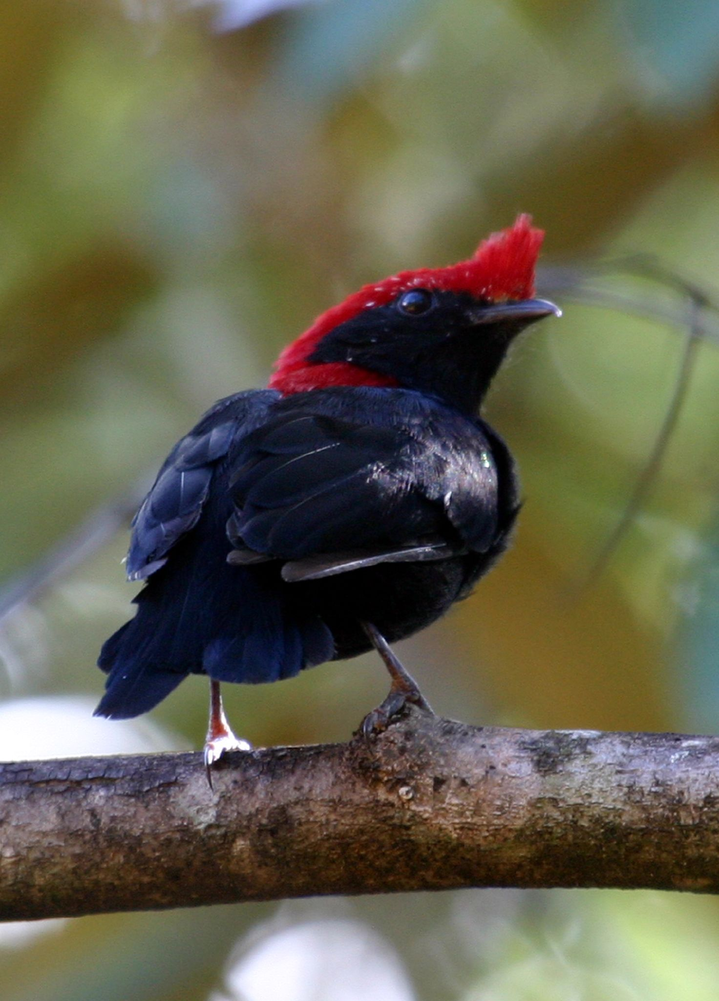 Helmeted Manakin Antilophia galeata male. Jardim Botânico, Brasília (DF), Brasil.